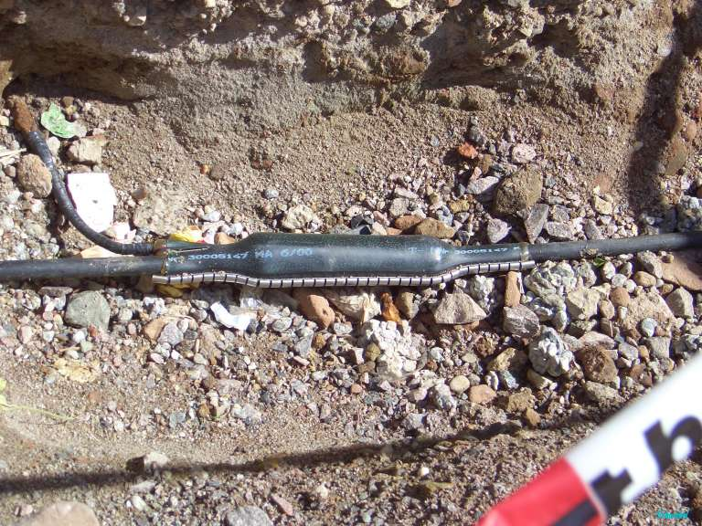 Verbindungs- und Abzweigschrumpfmuffe (VASM) der Deutschen Telekom; hier als Abzweigmuffe für einen Hausanschluss (Kabel das links oben aus der Muffe herauskommt). Das Hausanschlusskabel ist ein altes Bleimantelkabel.